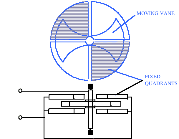 المخطط الصندوقي للفولتميتر كهروستاتيكي من النوع ذا الربع دائرة